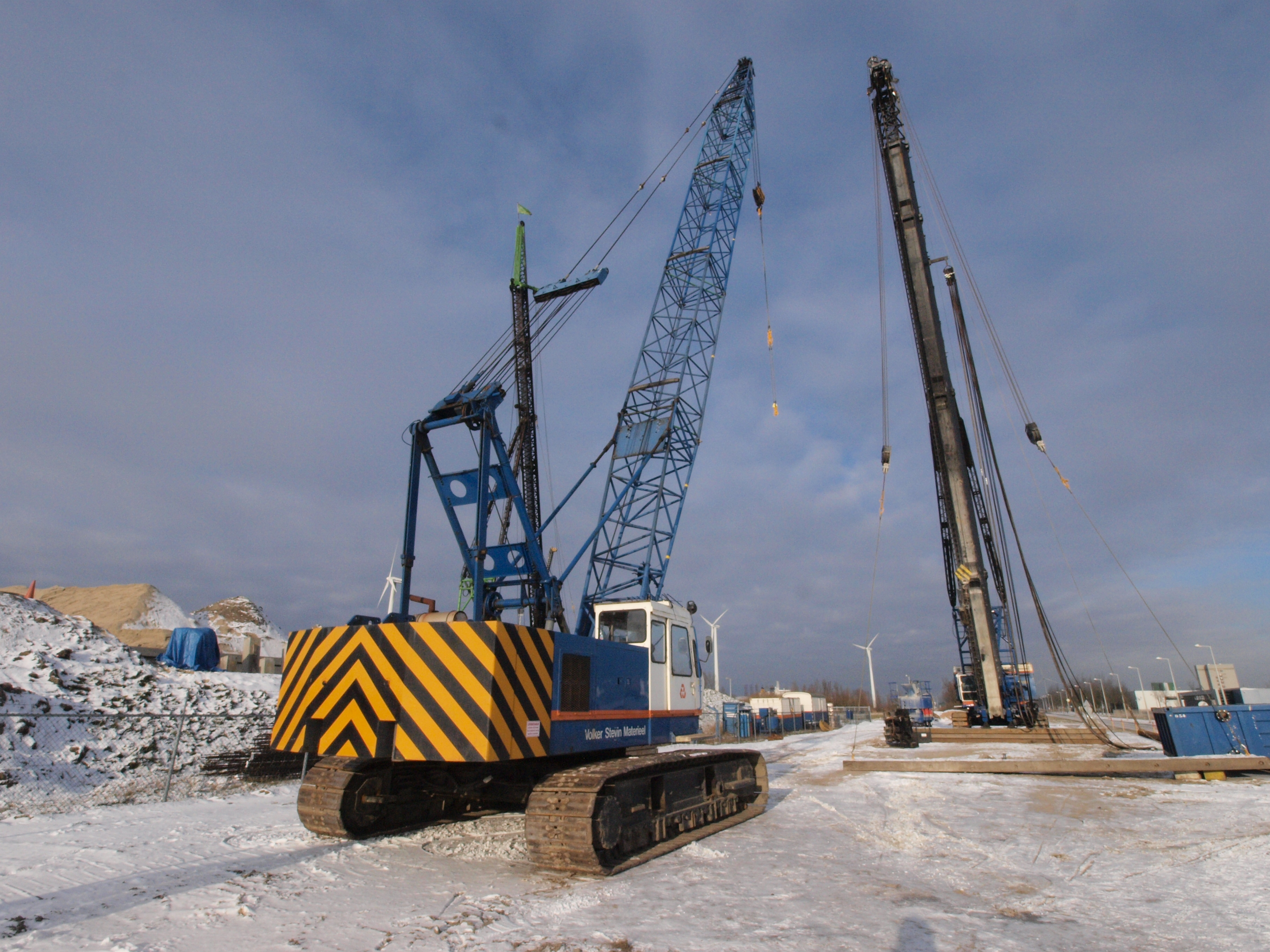 Cranes near Amsterdam